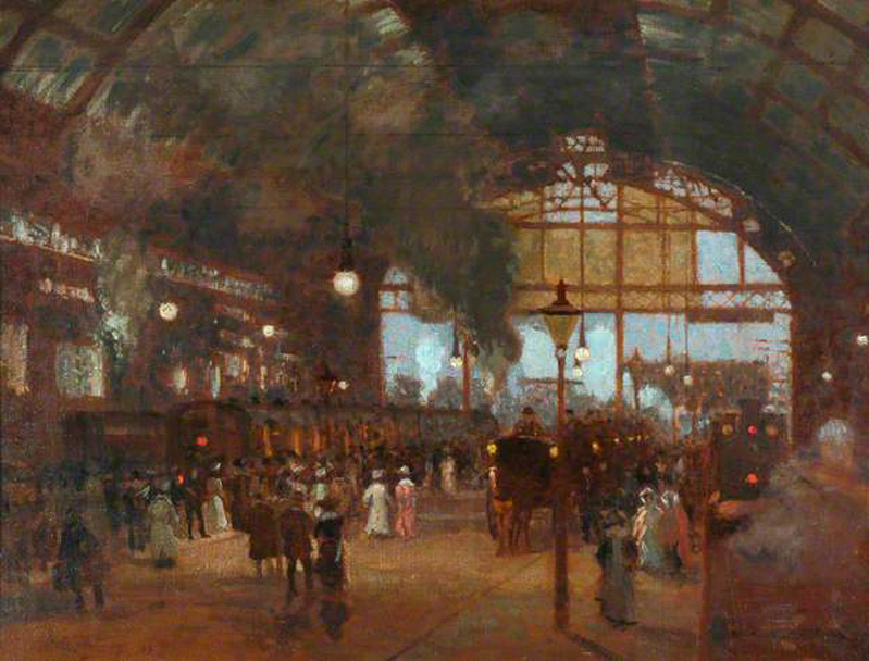 Estación de Cannon Street - óleo sobre lienzo - Alto: 96,5 cm. Ancho: 121,2cm. - Museo Nacional del Ferrocarril, Inglaterra